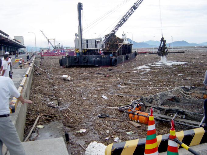 kusatsu_gyoko_typhoon_2005.